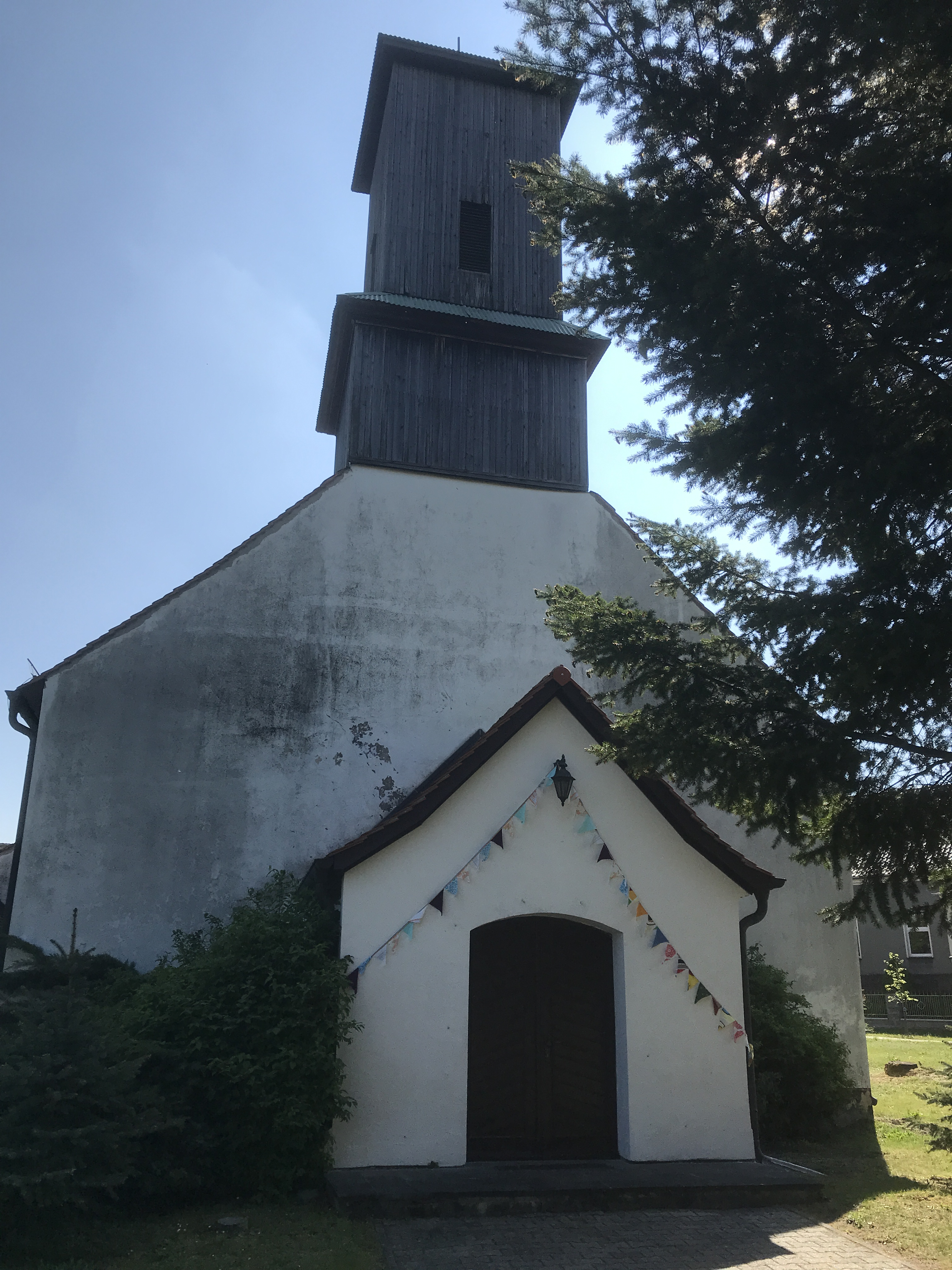 Die Dorfkirche Pillgram im gleichnamigen Ortsteil der Gemeinde Jacobsdorf im Landkreis Oder-Spree ist eine Feldsteinkirche aus dem Mittelalter. Die Kirchenausstattung ist neuzeitlich aus den 1950er Jahren.